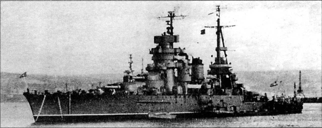 Линейный корабль Новороссийск в Севастополе, начало 1950-х годов.